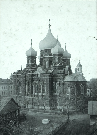 Тула